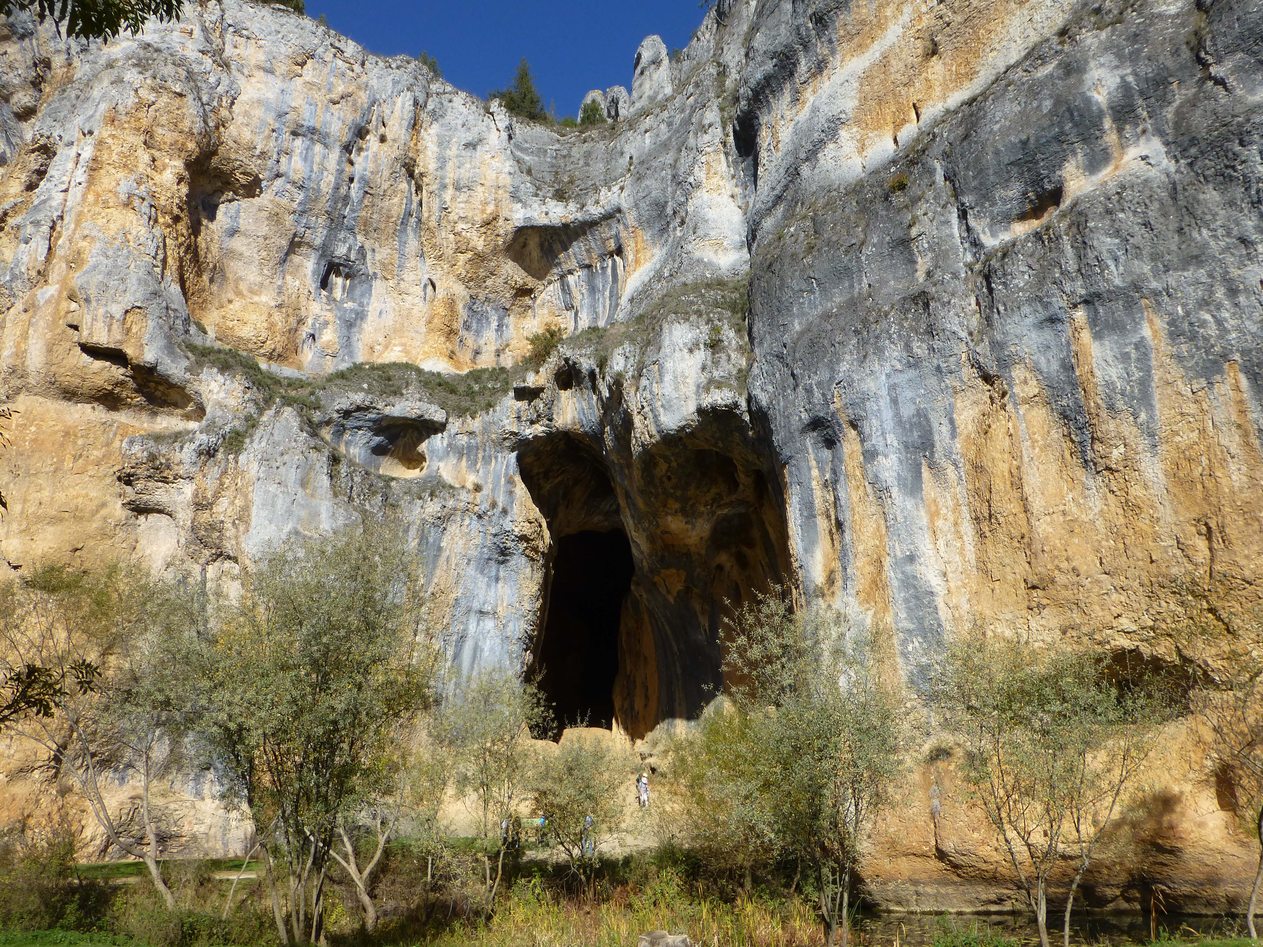 Cueva Grande, Cañón del Río Lobos. Soria, España.